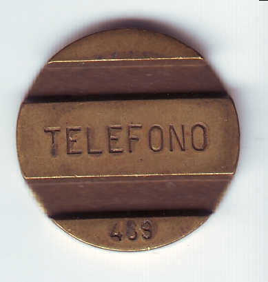 Cospel telefonico para llamadas locales